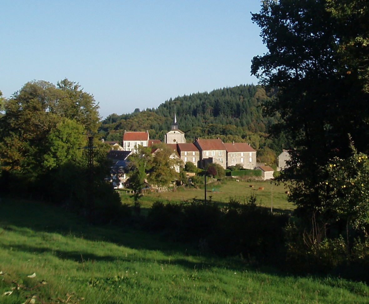 village